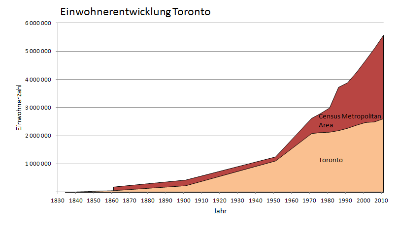 Einwohnerentwicklung von Toronto und der Census Metropolitan Area zwischen 1834 und 2011